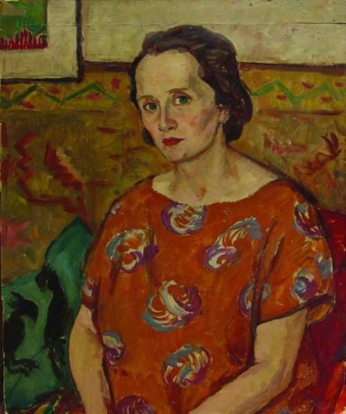 Ştefan Dimitrescu(1886-1933) - Ecaterina Tonitza, portretul soţiei lui Nicolae Tonitza, Ecaterina. Lucrarea a fost tăiată, iar semnătura recuperată şi pusă pe verso. Verso: certificat de participare la expoziţia Ştefan Dimitrescu 1959 de la Muzeul Naţional de Artă, ulei pe carton, 48x57,5 cm.